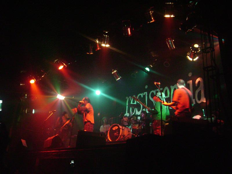 Resistencia Suburbana en 2008.